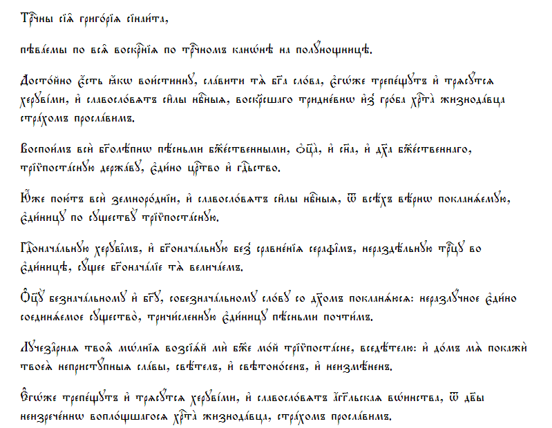 Троичны Григория Синаита из Октоиха